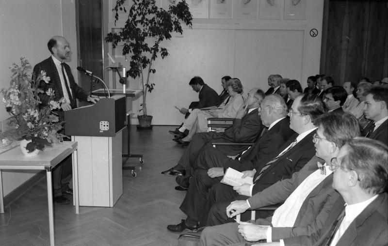 13.06.1991 Verleihung des Heinz-Maier-Leibnitz-Preises 1991 des BMBW in Berlin der Technischen Universität. Die Preise überreicht Parlamentarischer Staatssekretär Dr. Norbert Lammert.